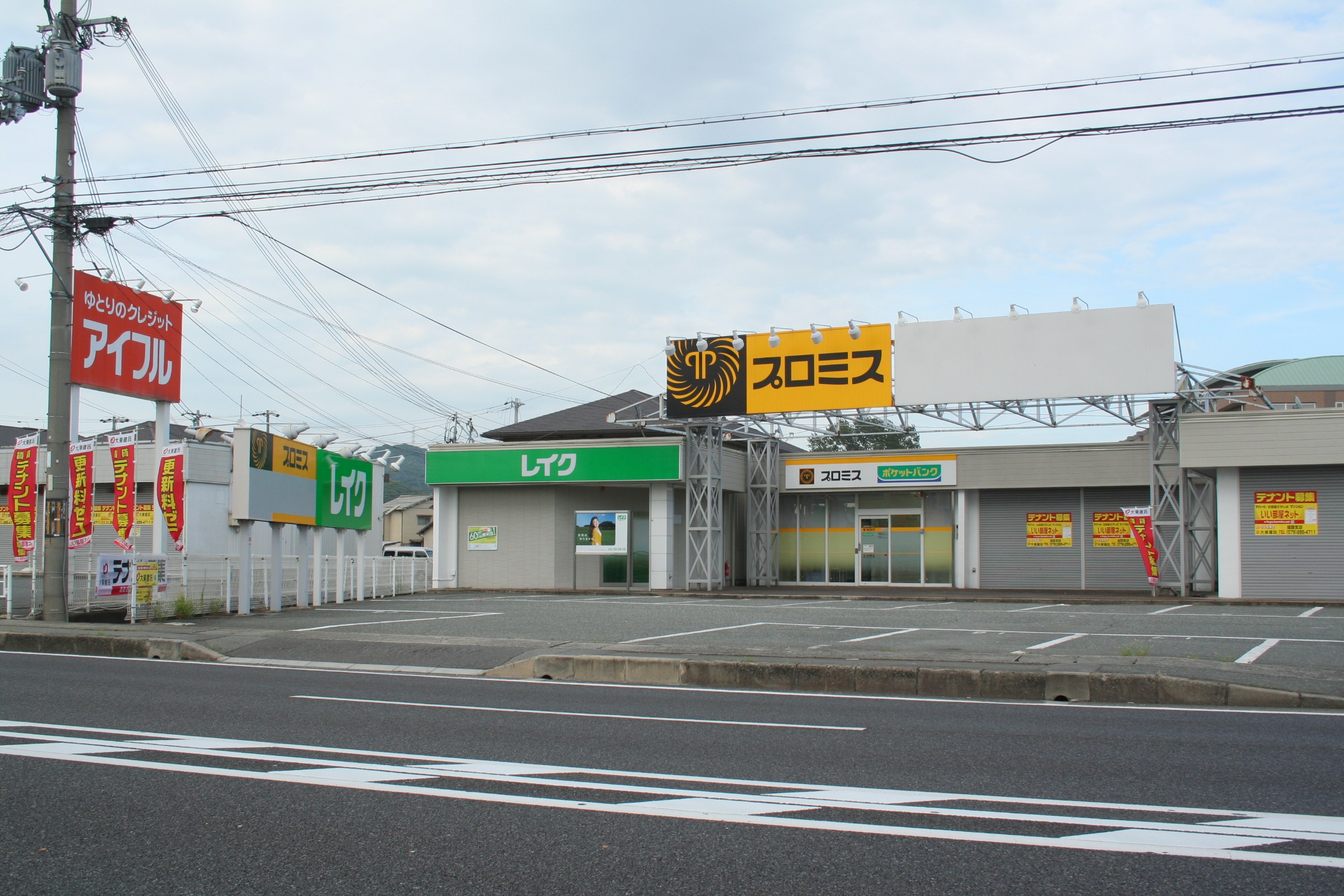 主に姫路市内の店舗の画像。そして飲食物。 プロミスとレイクの店舗。